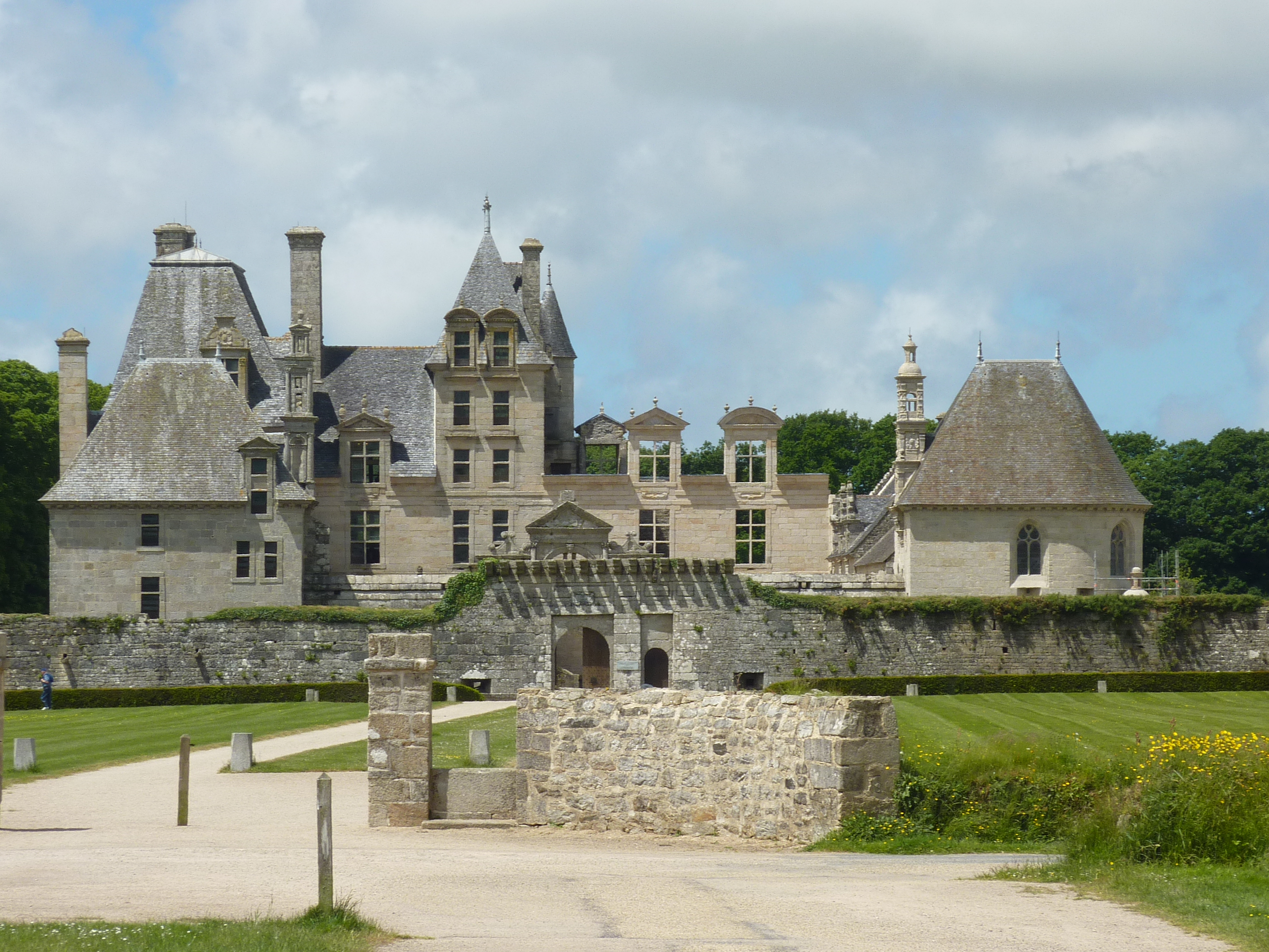 Château de Kerjean vue générale depuis l'entrée